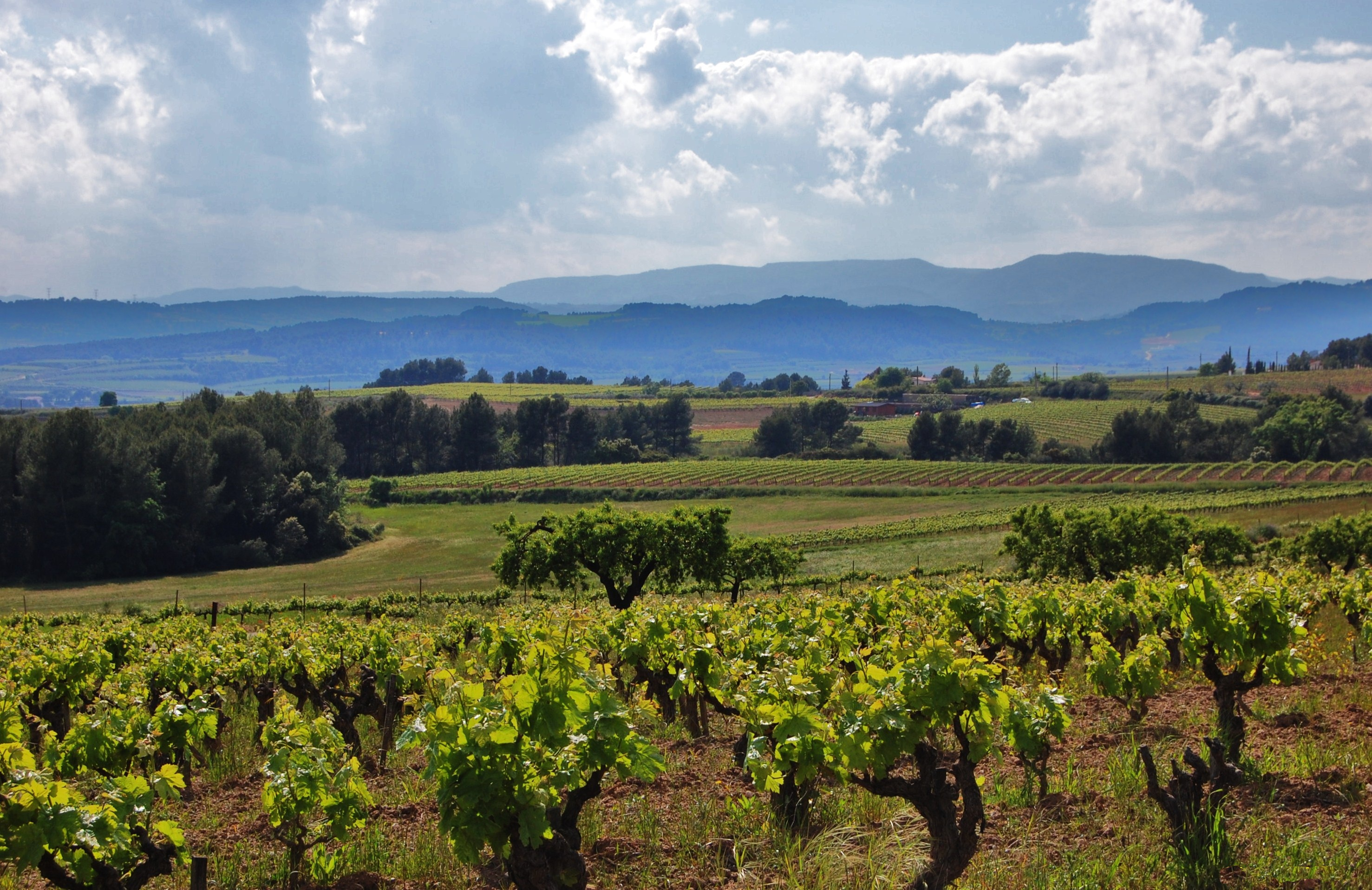 Paisatge de vinyes a Piera This is a a photo of a natural area in Catalonia, Spain, with id: ES510267